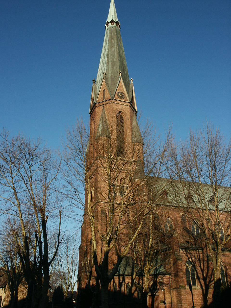 Bild des Turmes der Liebfrauenkirche in Bottrop, aufgenommen vom Nordring. Baudenkmal Nr.92 in Bottrop, Nordrhein-Westfalen